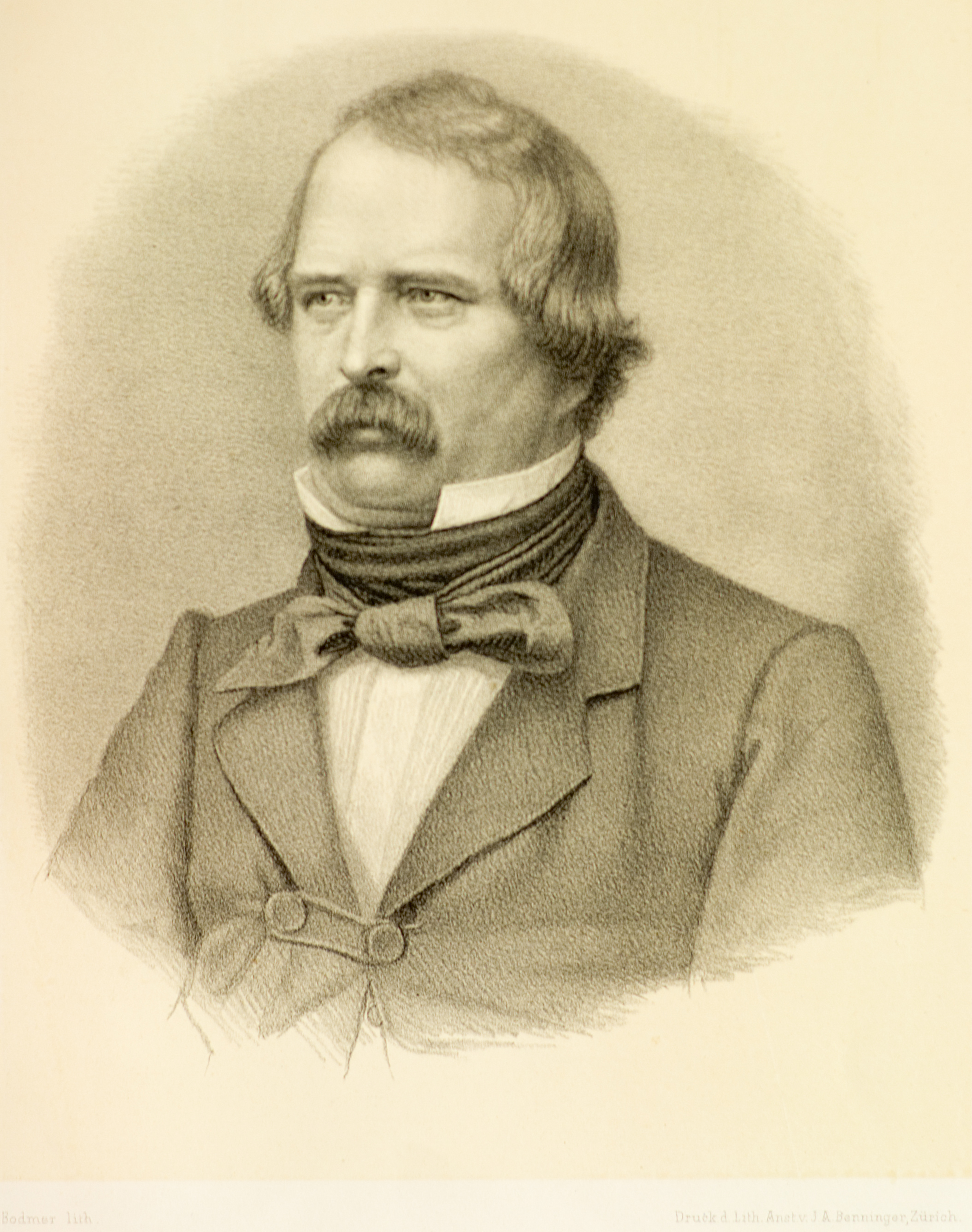 Ferdinand Stadler, Architekt, Schweiz Im Fusse steht: "Bodmer Lith". Es könnte sich um den zu der Zeit bekannten Lithografen Heinrich Bodmer (1814–1901). Gemäss Historischem Lexikon der Schweiz, Ausgabe 1932 befindet sich das Original in der „Bibl. nat. Berne“